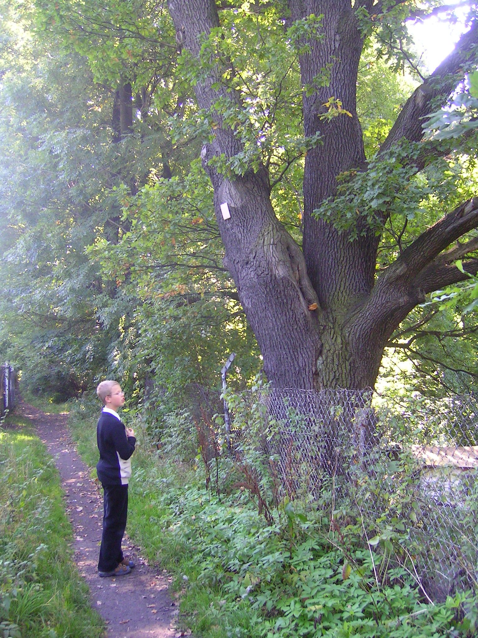 Wałbrzych - Stary Zdrój autor: Radwa Dąb szypułkowy przy ul. Kujawskiej - Pomnik przyrody